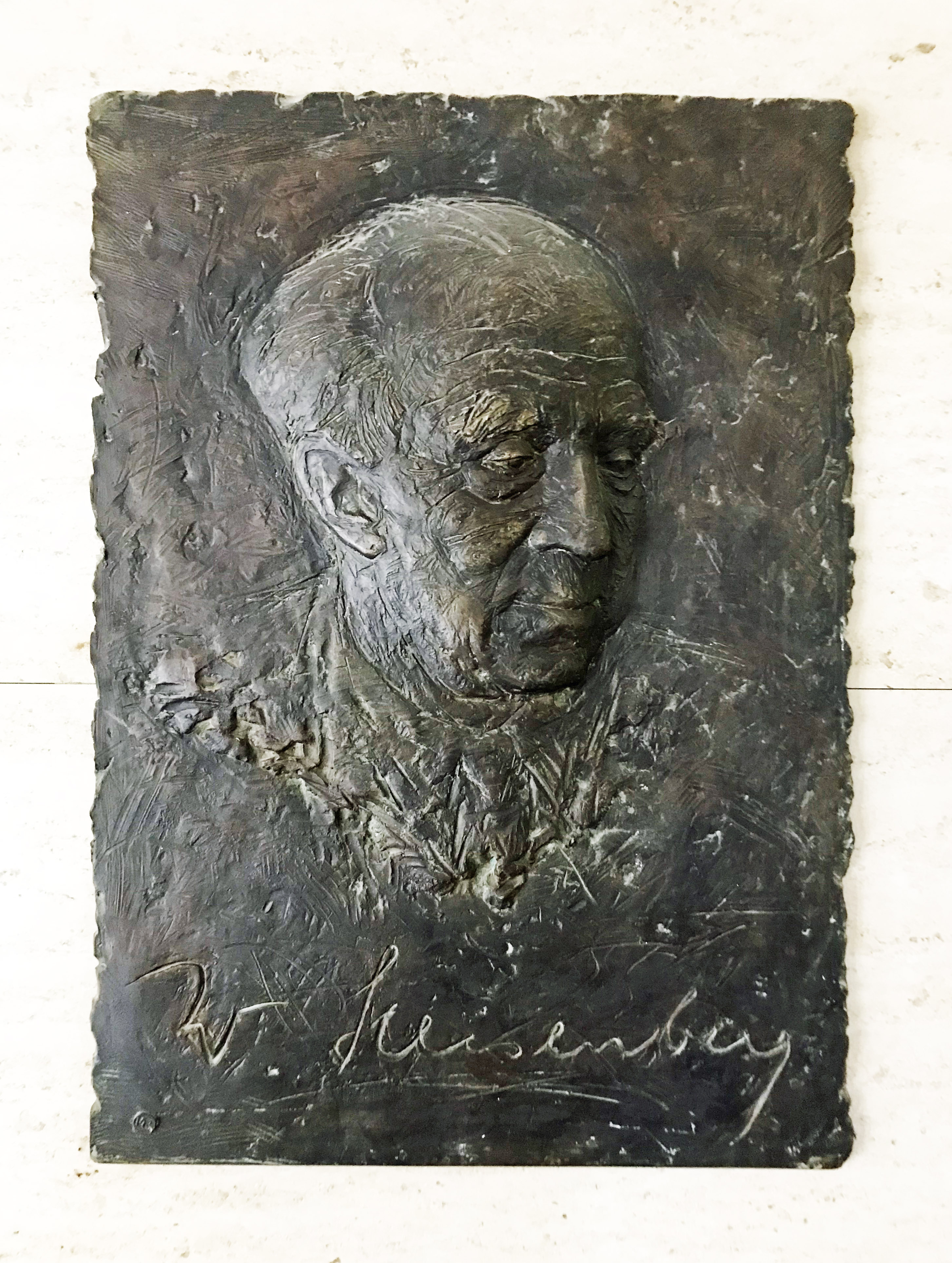 Bronzetafel Werner Heisenberg im Foyer des Physikgebäudes der Universität Leipzig